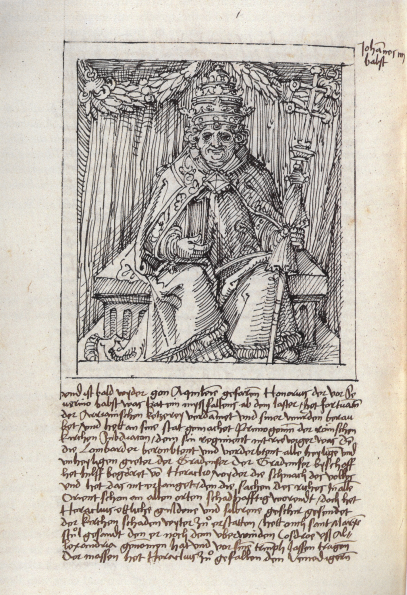 Papst Johannes IV. (?), Seite aus: Thomas Murner: Marci Antonii Sabellici History von anbeschaffener Welt, Schlettstadt 1534/1535, Autograph Murners mit wohl eigenhändiger Illustration Badische Landesbibliothek, Cod. Karlsruhe 3117